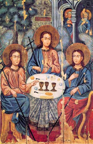 Тройца. Другая чвэрць ХVІІІ ст. З в. Альгомель Столінскага р-на. Нацыянальны мастацкі музей Рэспублікі Беларусь